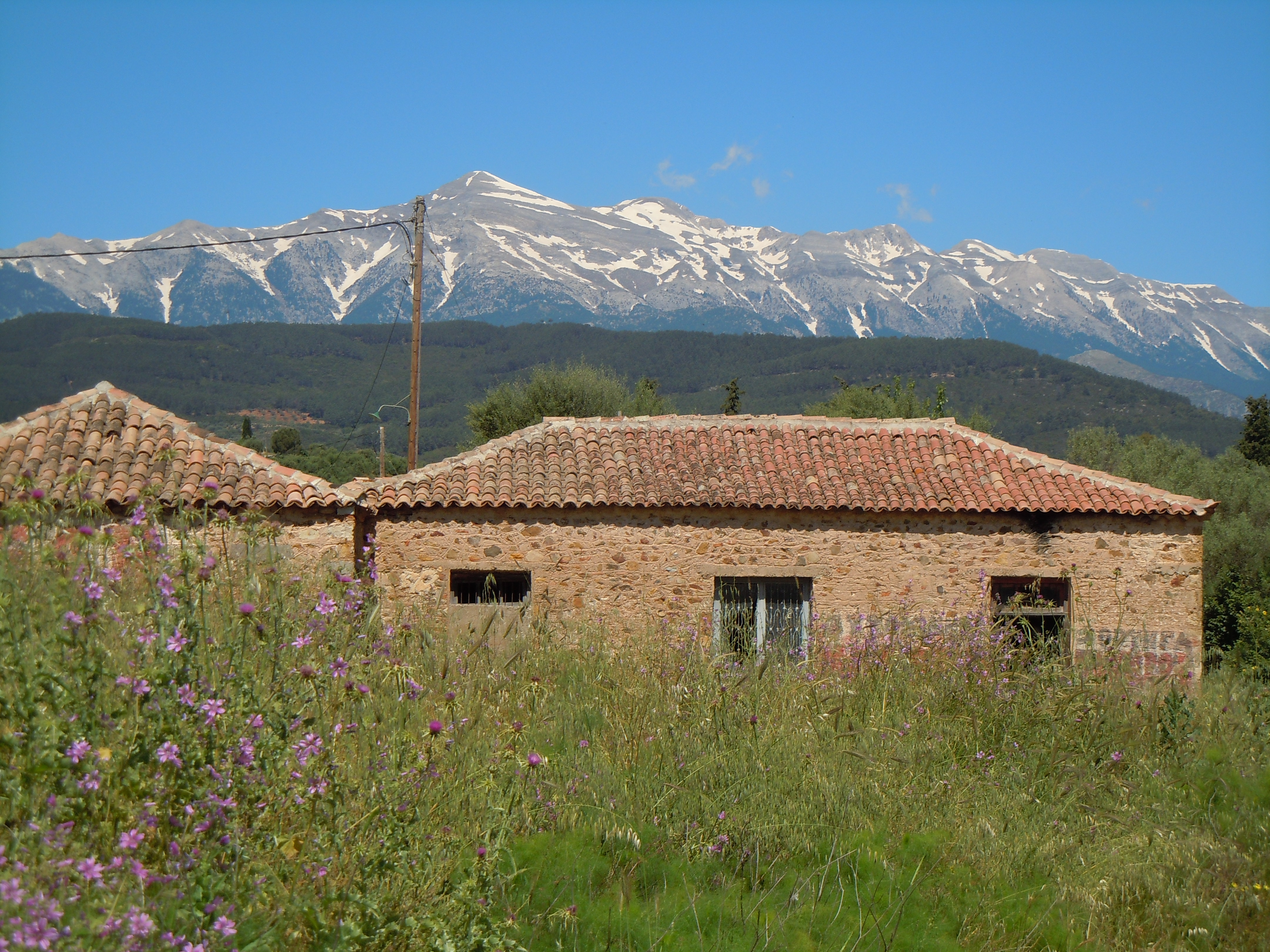 Vue du massif du Taygète depuis les environs de Krokee